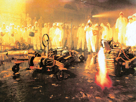 Performance "Blei!" beim Festival "Lust auf Hölle", Freiburg i. Br. 1991